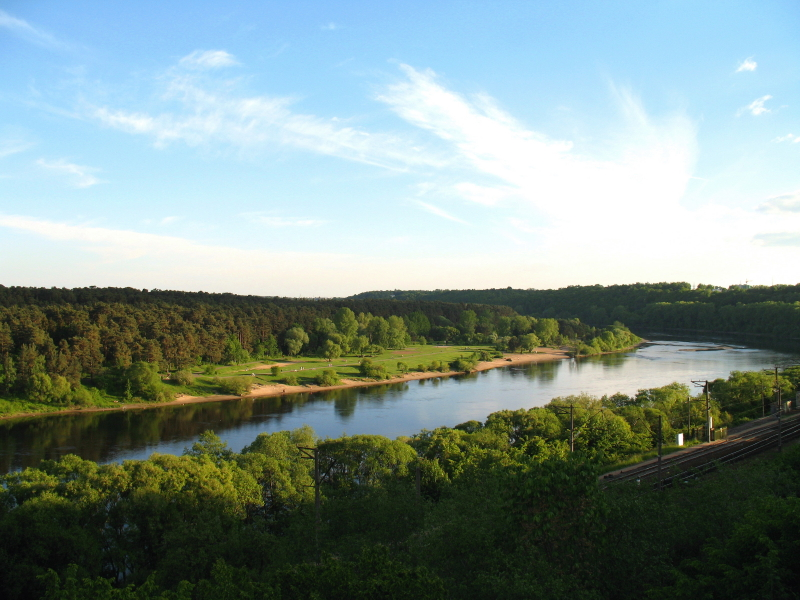 Panemunės šilas, Kaunas.